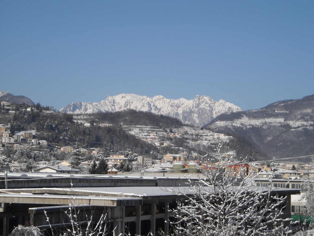 Vista di Valdagno e del Pasubio